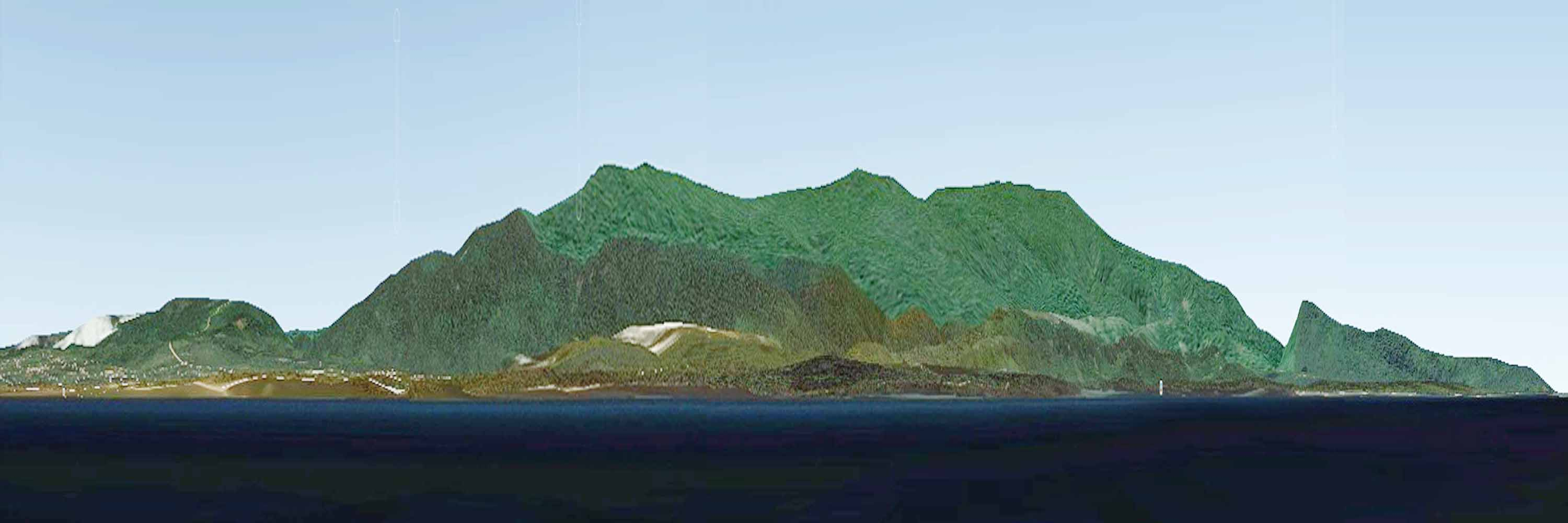 Pulau Wawonii - Kabupaten Konawe Kepulauan - Propinsi Sulawesi Tenggara